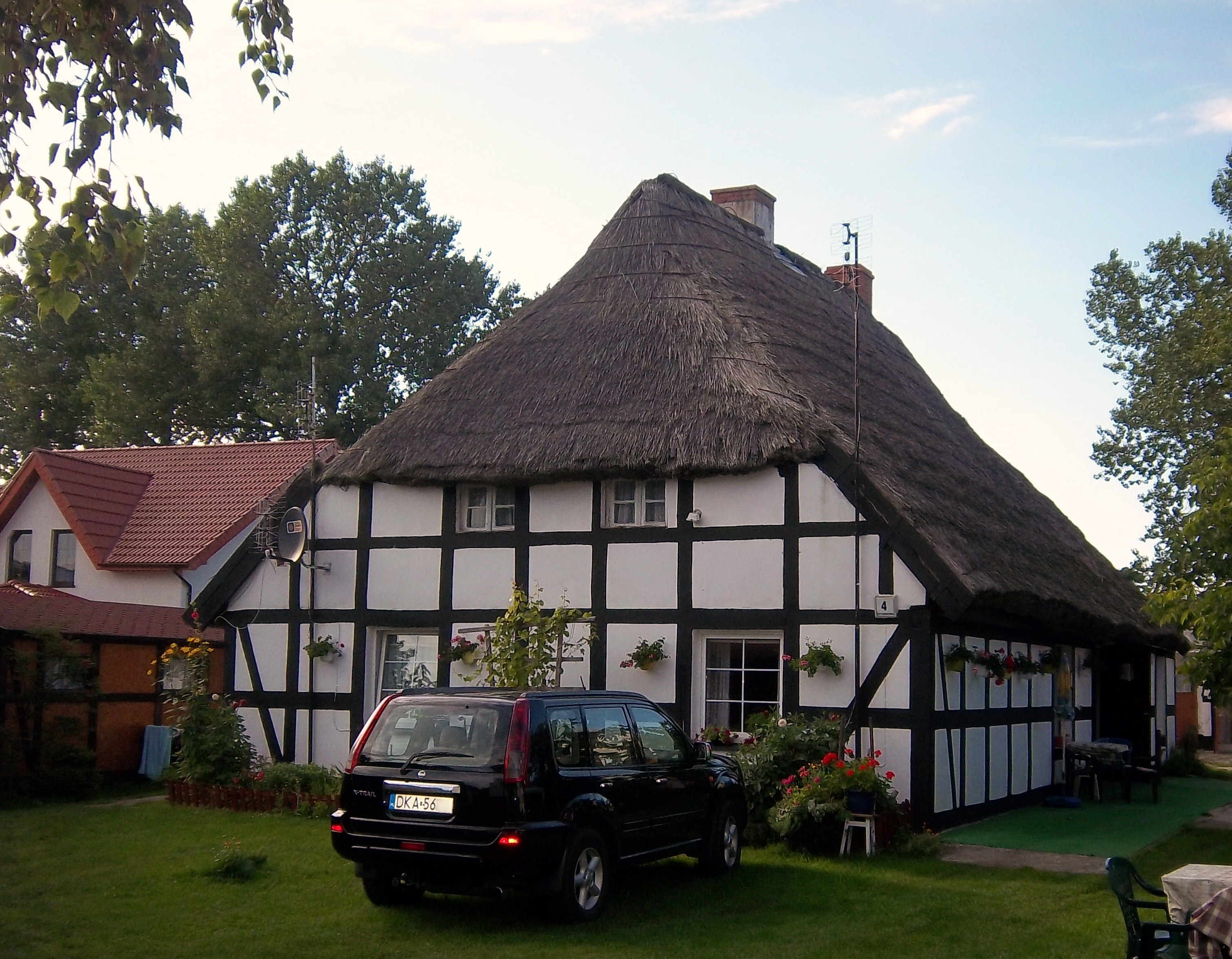 Chałupa rybacka we wsi Dąbki nr 21, ul. Sztormowa 4 (nr rej.875 z 31.01.1974)